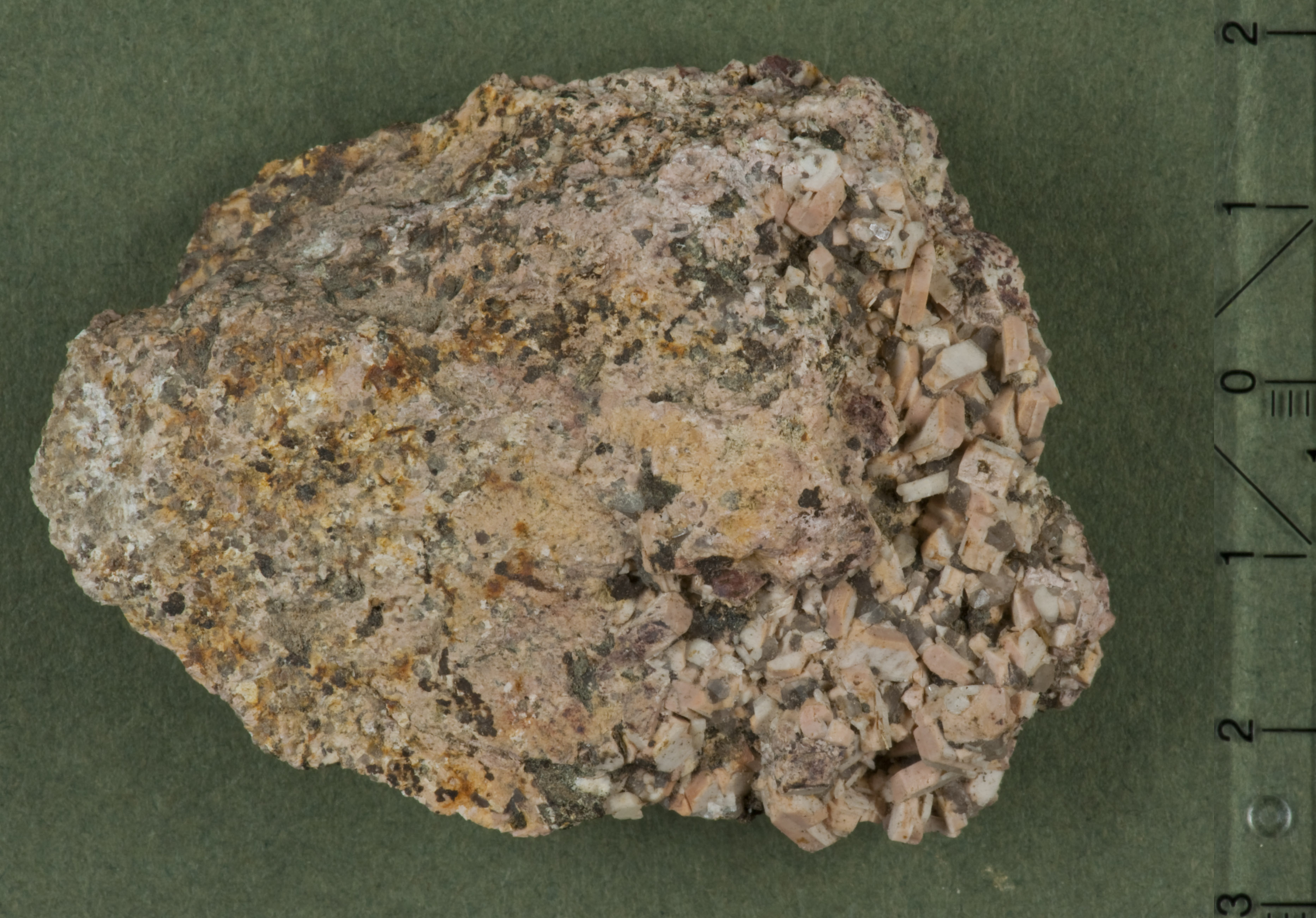 Hessonite on granite, Wurmberg, Braunlage, Harz, Germany